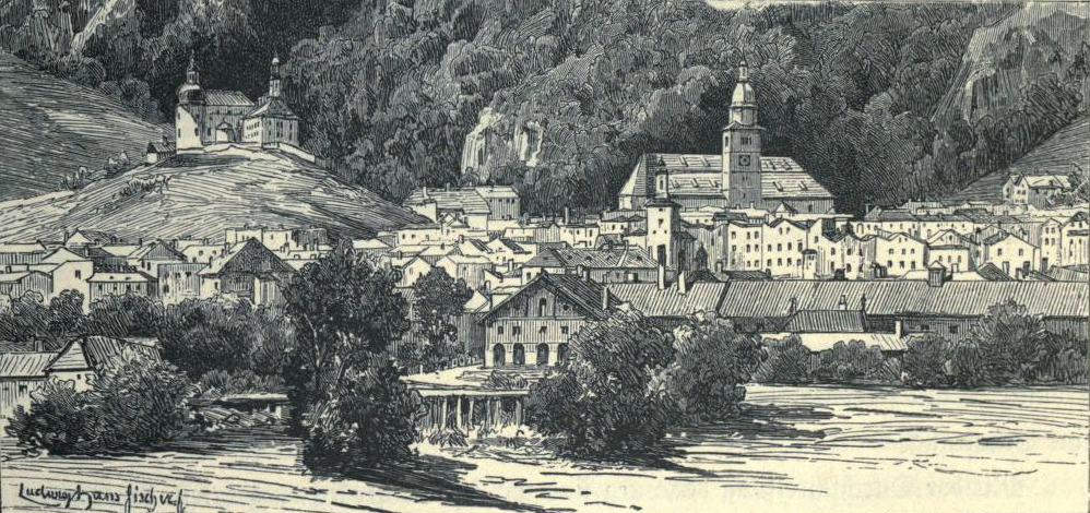 Hallein mit dem Dürrenberg. Alte Ansicht von Hallein aus "Die österreichisch-ungarische Monarchie in Wort und Bild.6. Band: Oberösterreich und Salzburg, 1889"